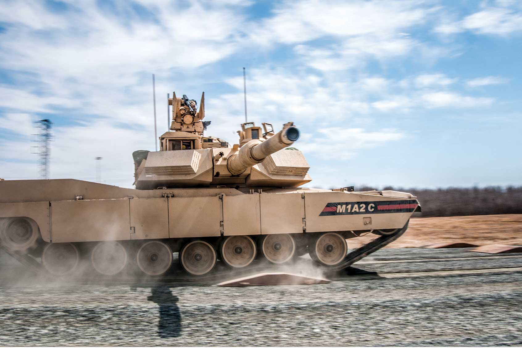 SEPバージョン3となるM1A2C